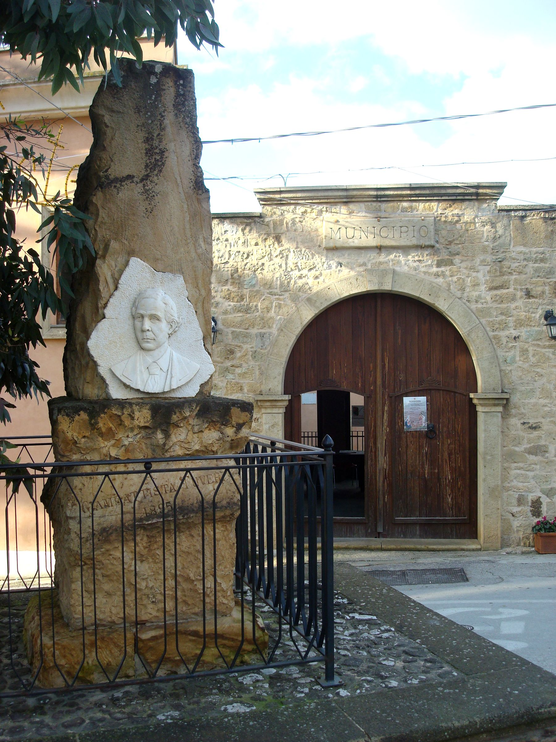 Monumento a Giovanni Battista Tuveri davanti all'ingesso laterale del municipio di Collinas.